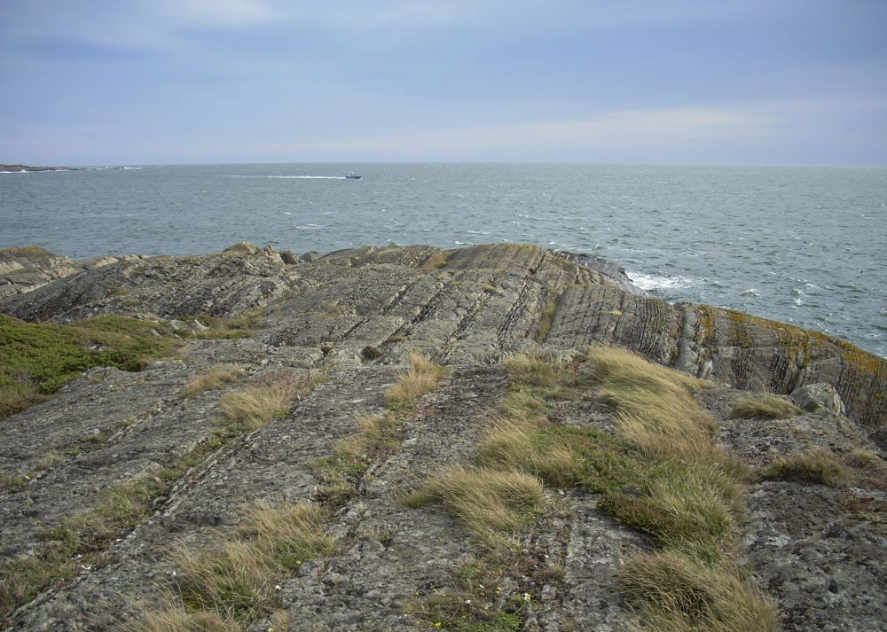 Lagene med forsteinede havbunnsedimenter fra kambrosilur er tydelige på odden i Styggås naturreservat.